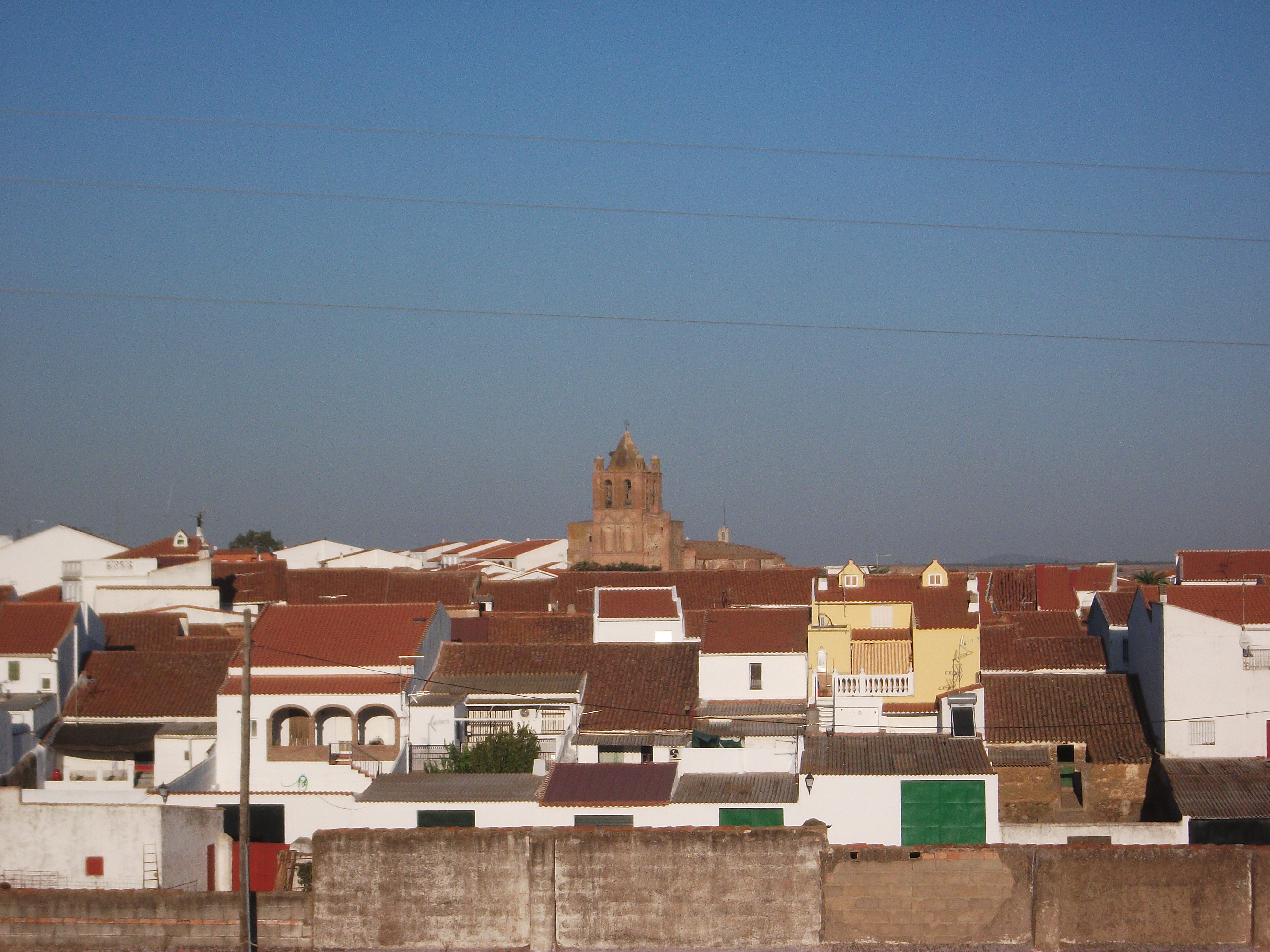 Vista de Ahillones